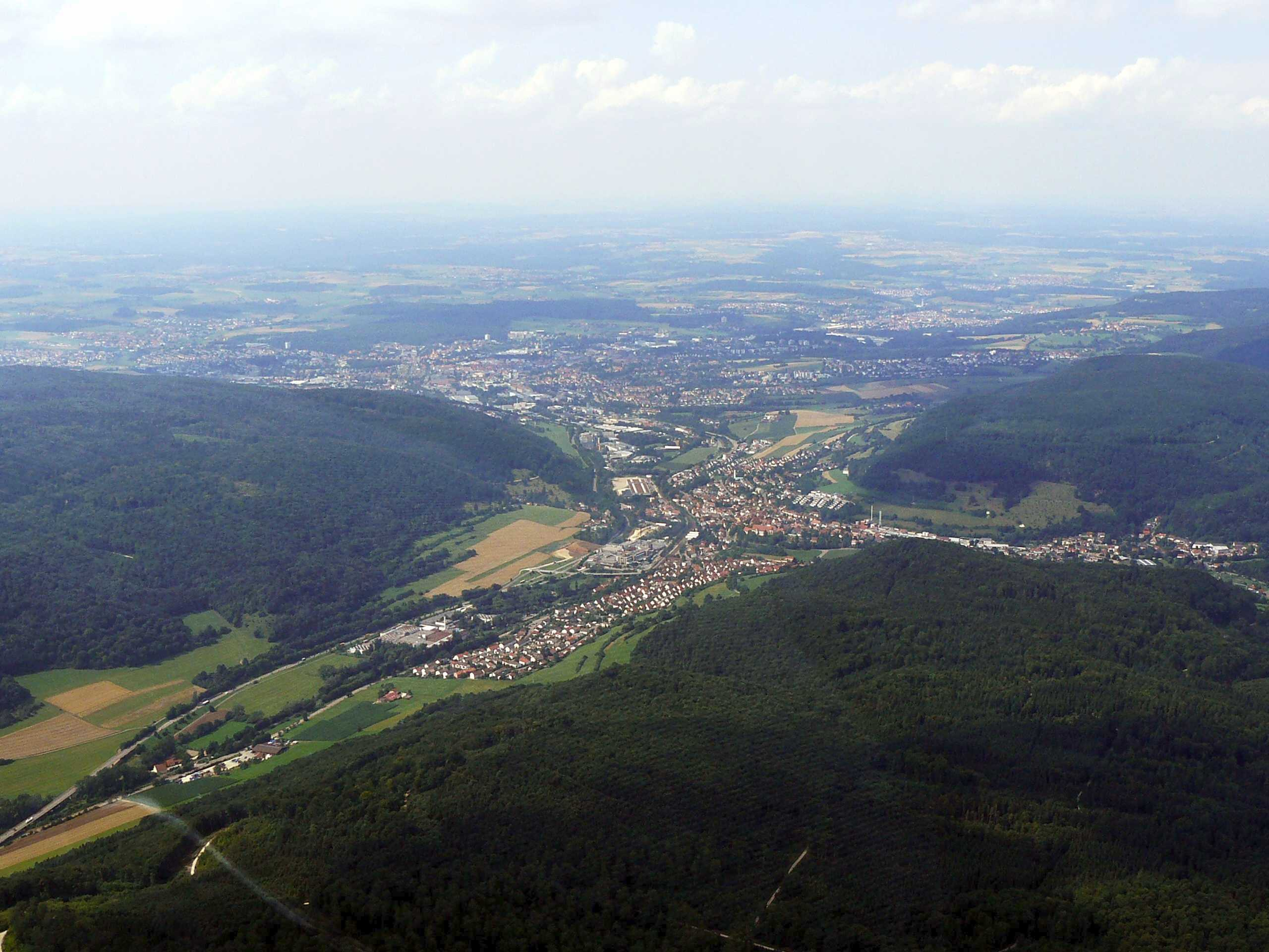 Aalen aus südlicher Richtung gesehen; im Vordergrund befindet sich Unterkochen, die Kernstadt dahinter